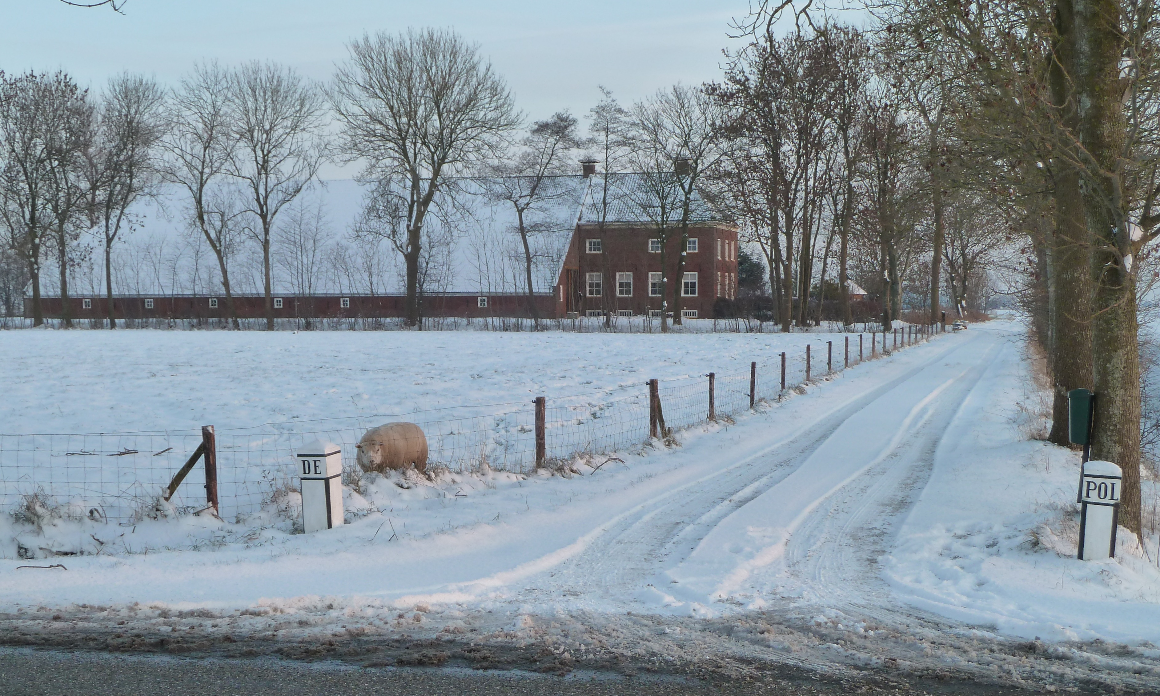 Oprit met naambordje en boerderij van De Pol in de Oude Ruigezandsterpolder nabij Lauwerzijl in de Nederlandse provincie Groningen.